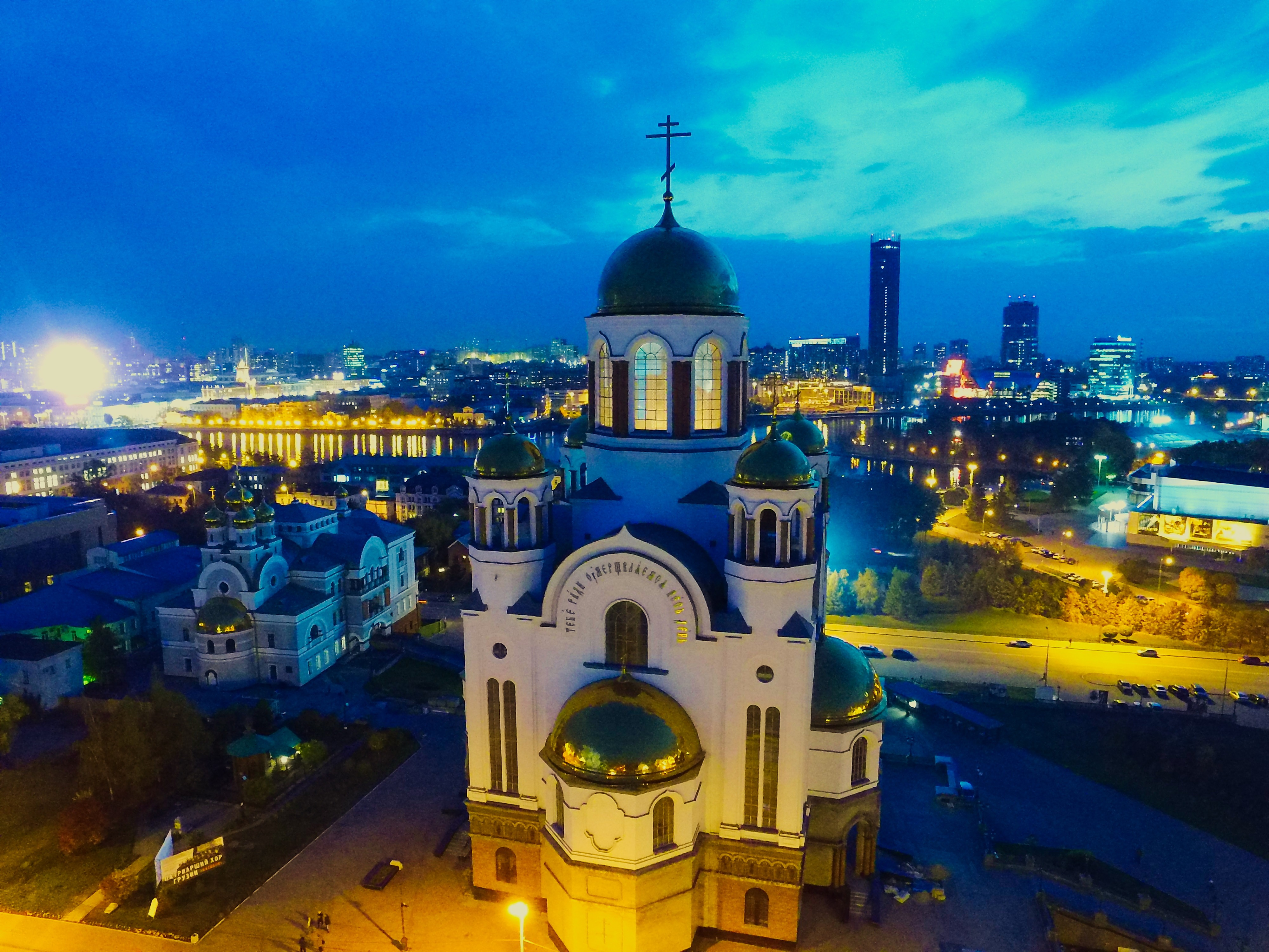 Место дома, где в июле 1918 г. были казнены император Николай II и члены его семьи: улица Карла Либкнехта, 49, Екатеринбург, Свердловская область